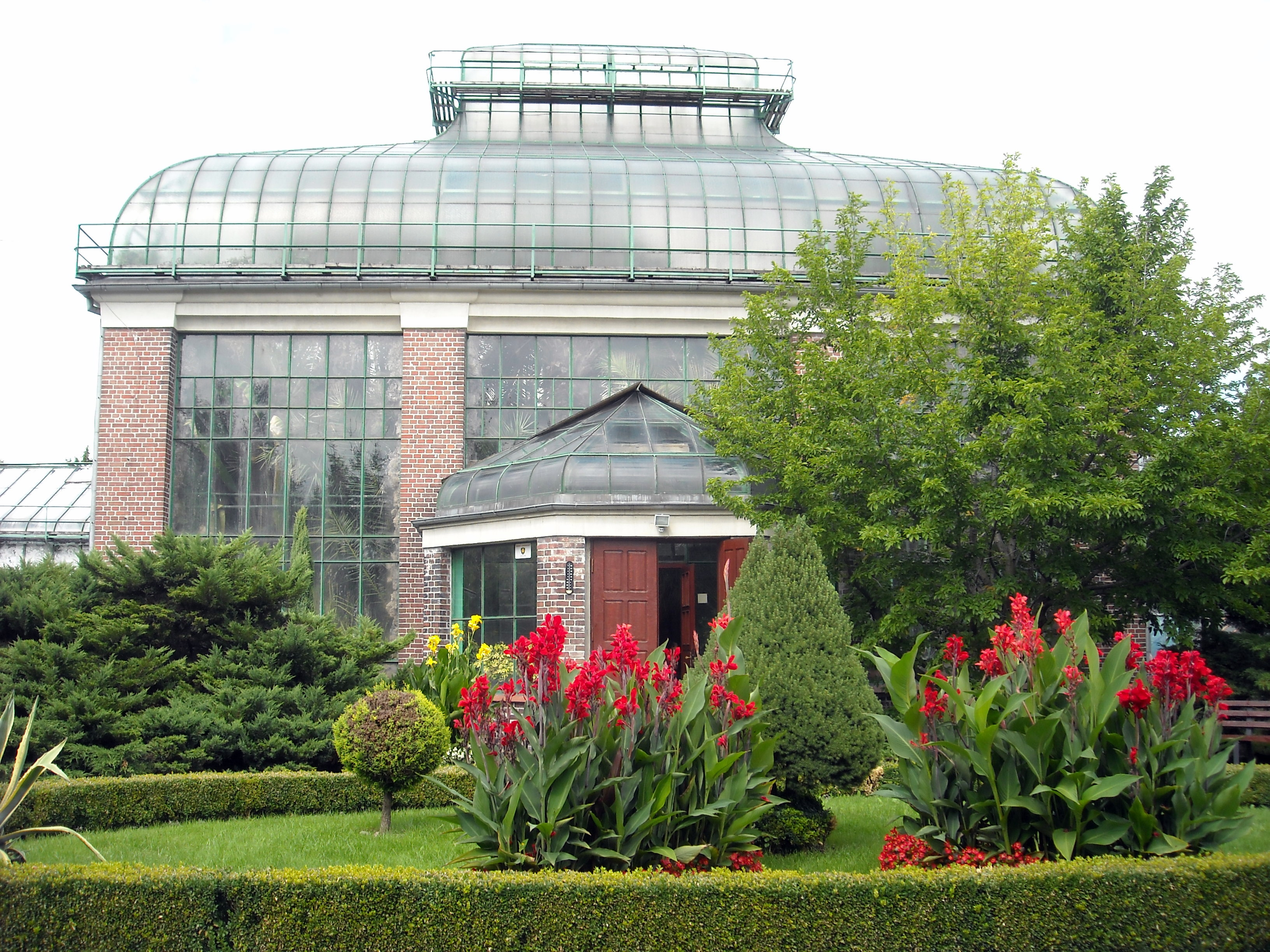 Wałbrzych, palmiarnia i szklarnie, 1911-1913